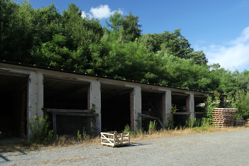 Fahrzeughallen der Volkspolizei-Ausbildungsstätte im ehemaligen Augustusbad